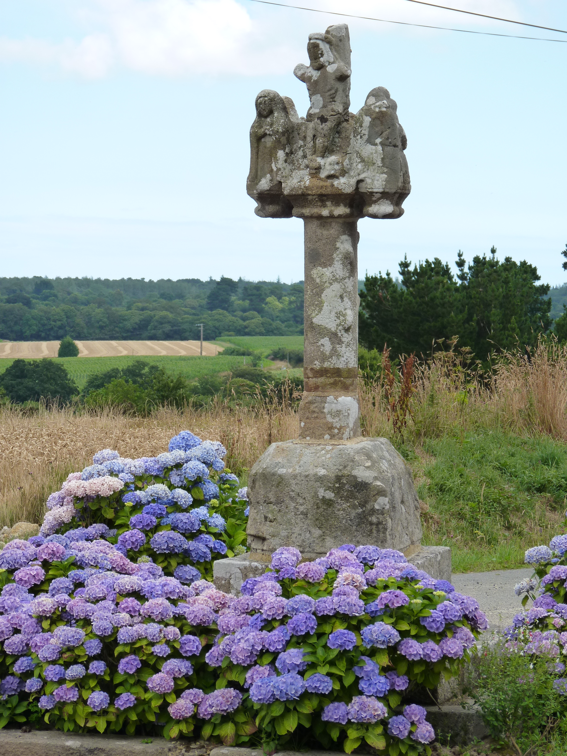 Calvaire du 17ème siècle